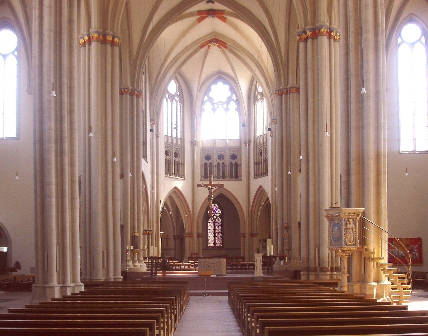 Propsteikirche St. Ägidien, Inneres